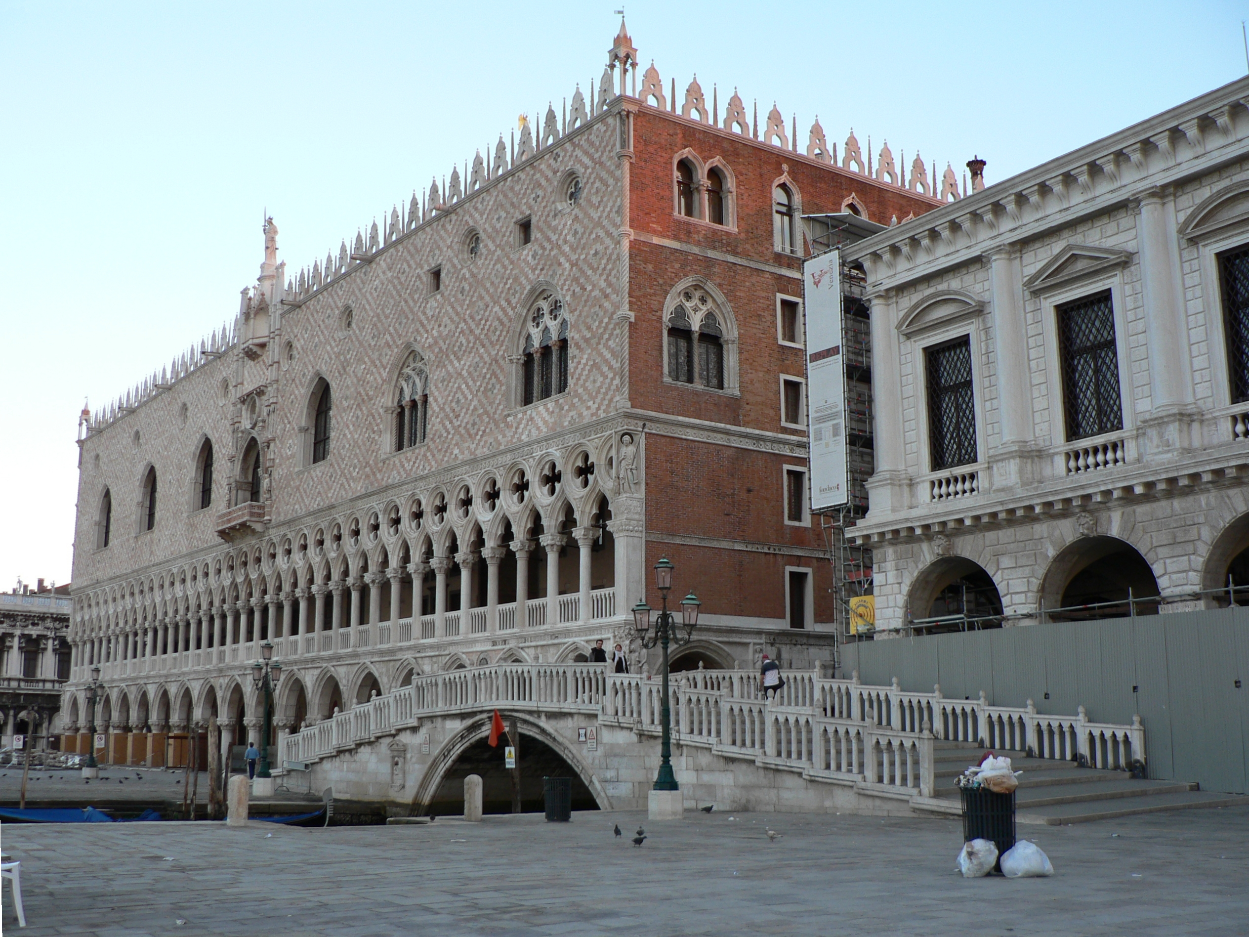 Venise (Italie), Le Palais des Doges, le matin